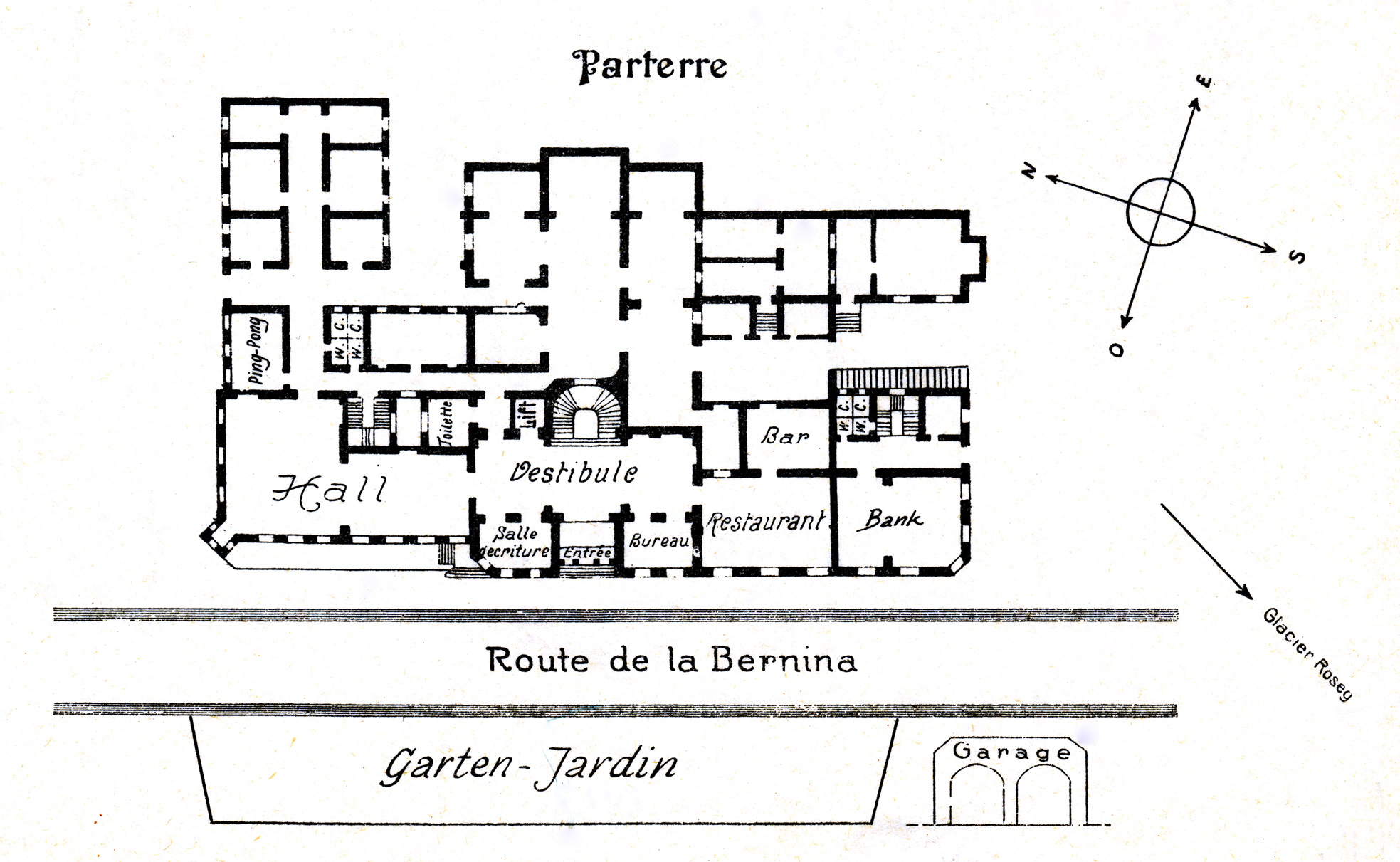 Hotel Pontresina, Grundriss Erdgeschoss